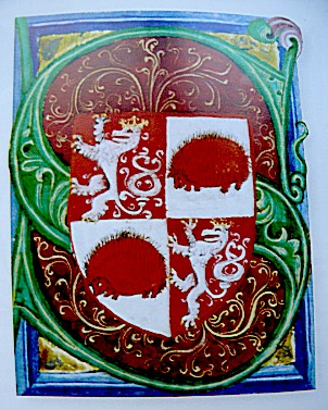 Iniciála S se znakem města Jihlava